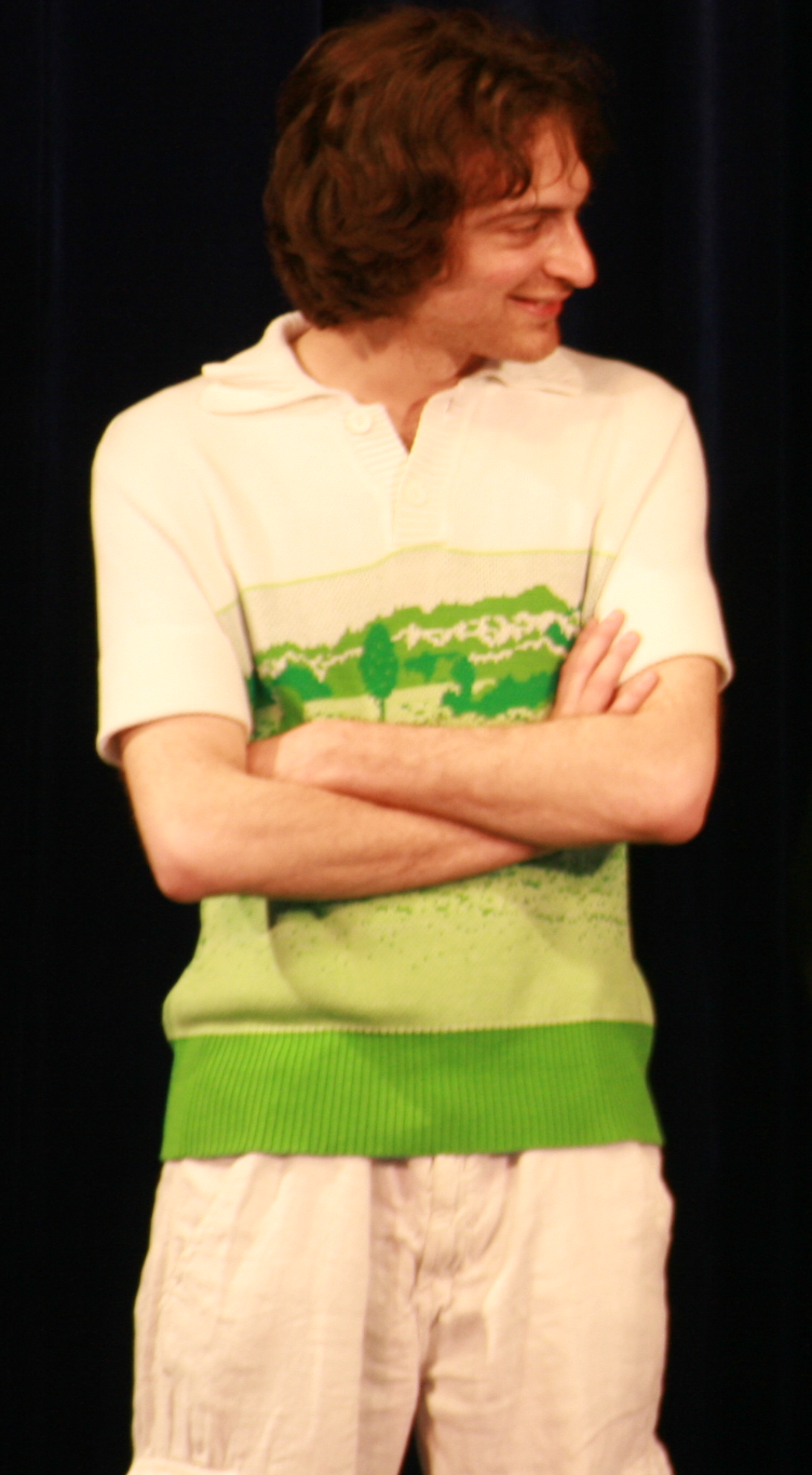 Micha Wald lors de la 46è Semaine Internationale de la Critique à Cannes